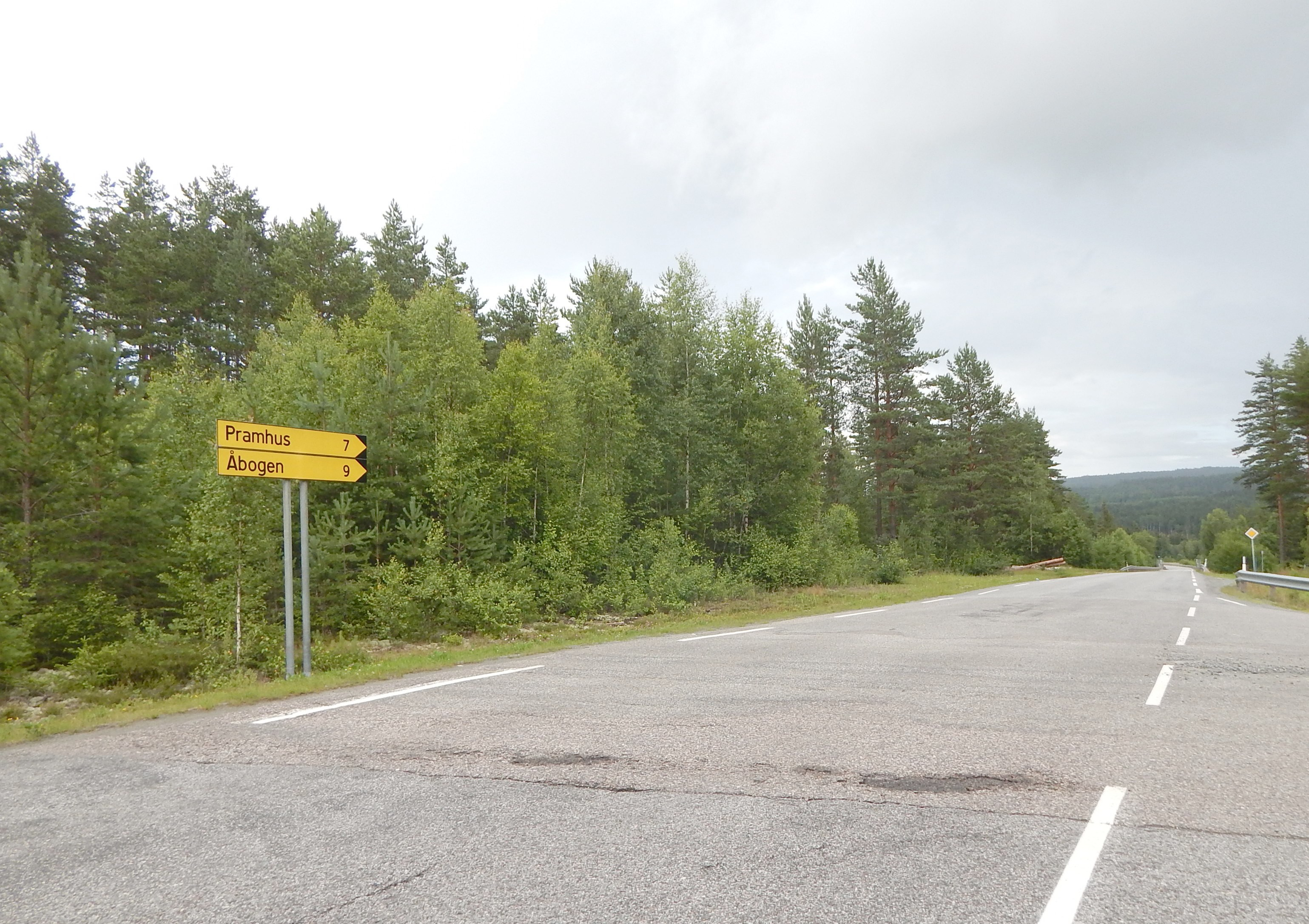 Bråtavegen (fylkesvei 1986, tidl. 342) like ved riksvei 2